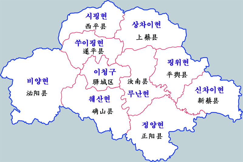 주마덴시 현급행정구역도